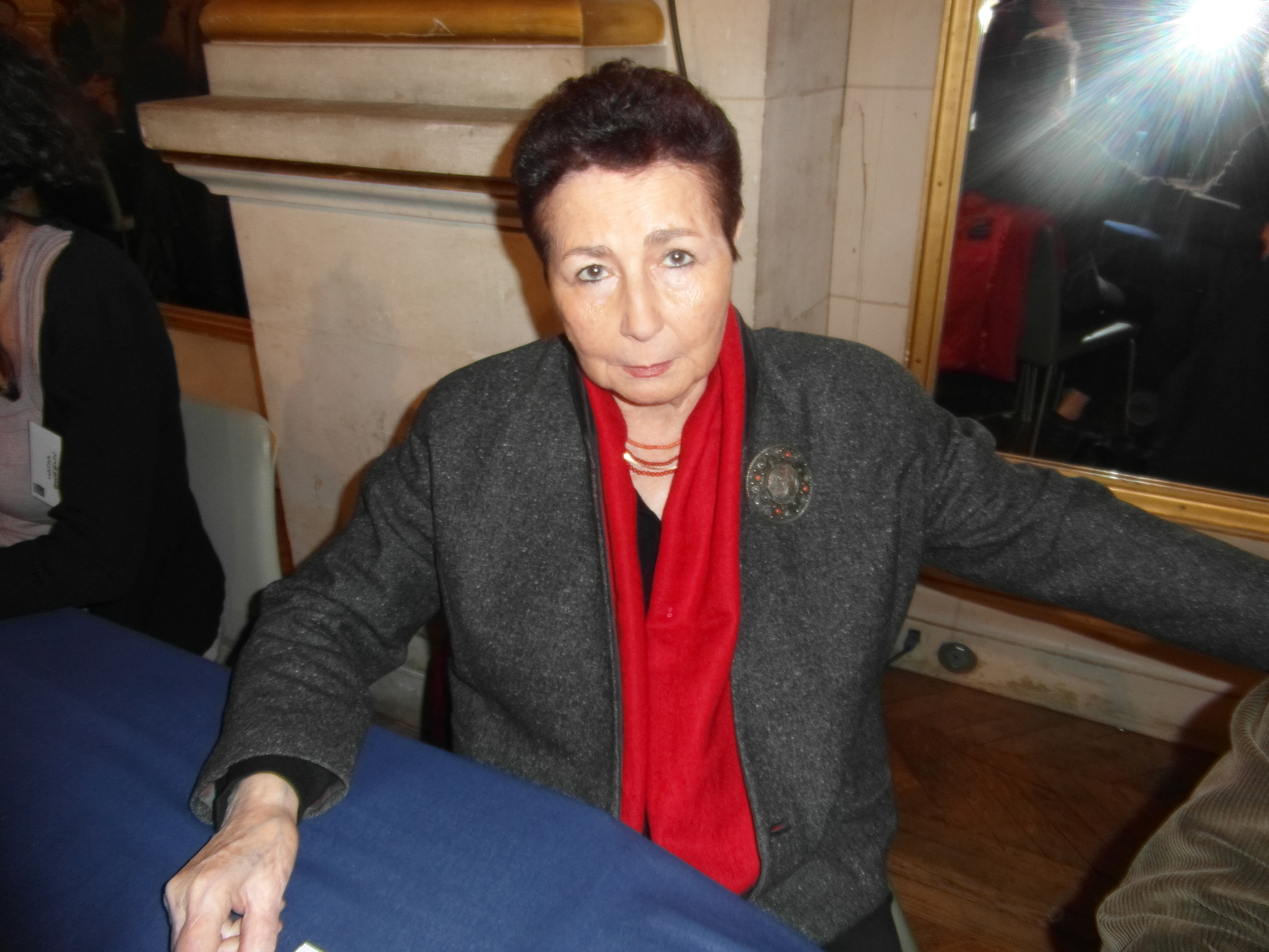 Maghreb des Livres, 7 et 8 février 2015